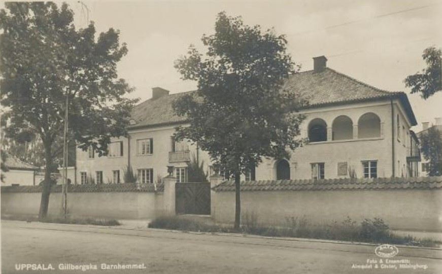 Old postcard of Gillbergska barnhemmet, Uppsala, Sverige (The Gillberg orphanage, Uppsala, Sweden)